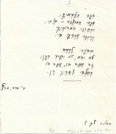 כתב היד של שירה של רחל "בְּגַנִּי נְטַעְתִּיךָ"